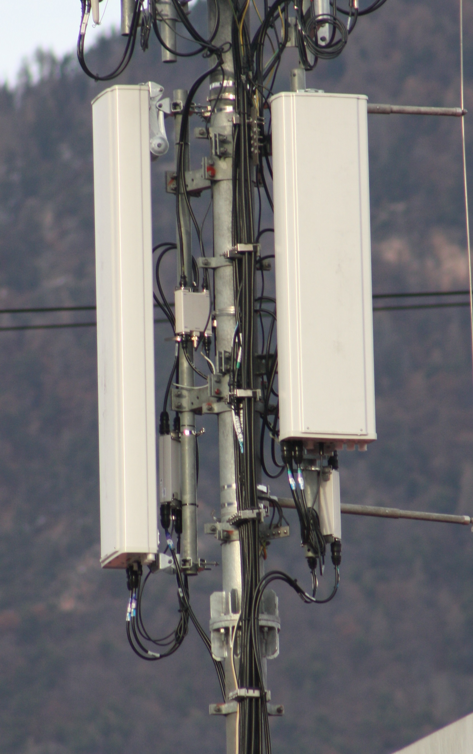 Kathrein Mobilfunkantenne in Italien